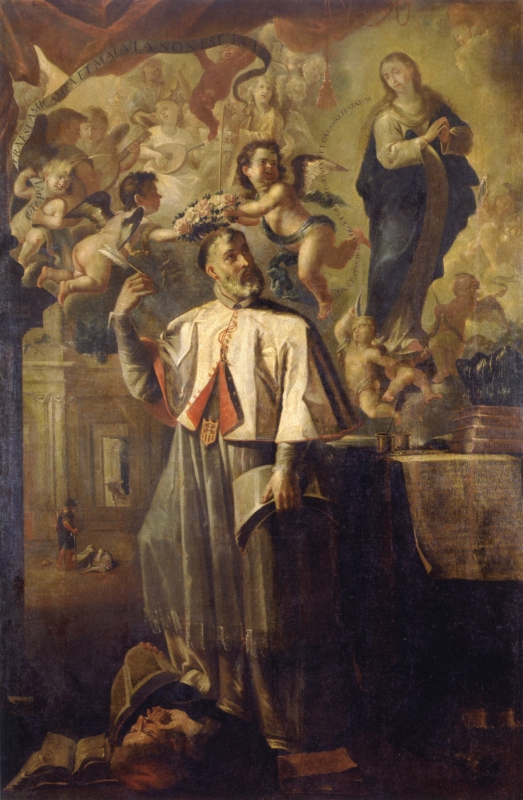 La obra representa a San Pedro Pascual († 1300), teniendo una visión.